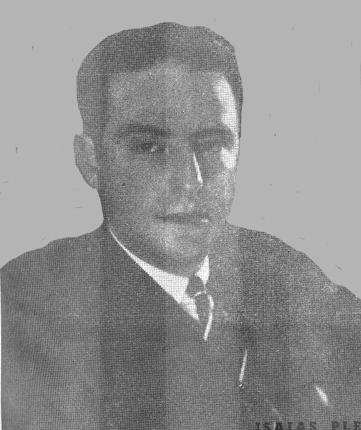 Isaías Pleci